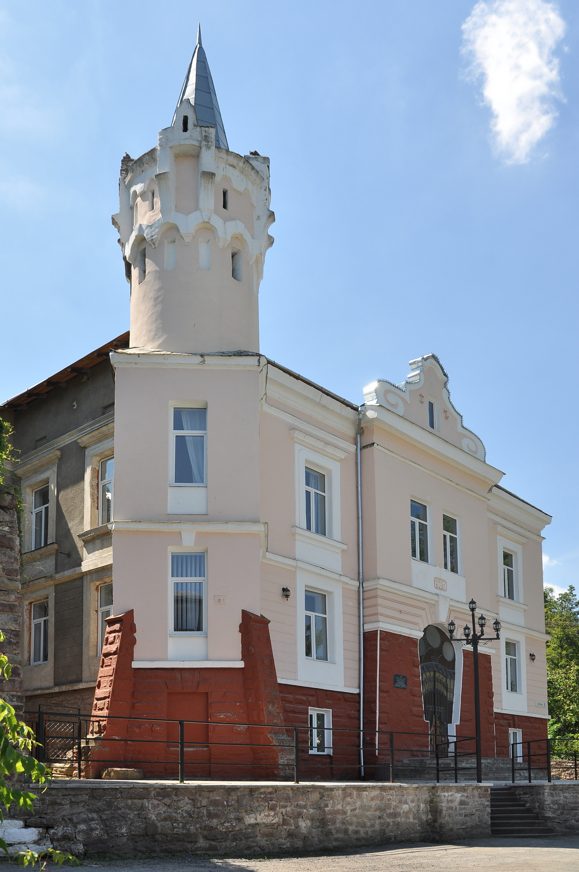 Пам'ятка архітектури місцевого значення в Бучачі: Будинок-читальня на вул. Шкільній, 8.